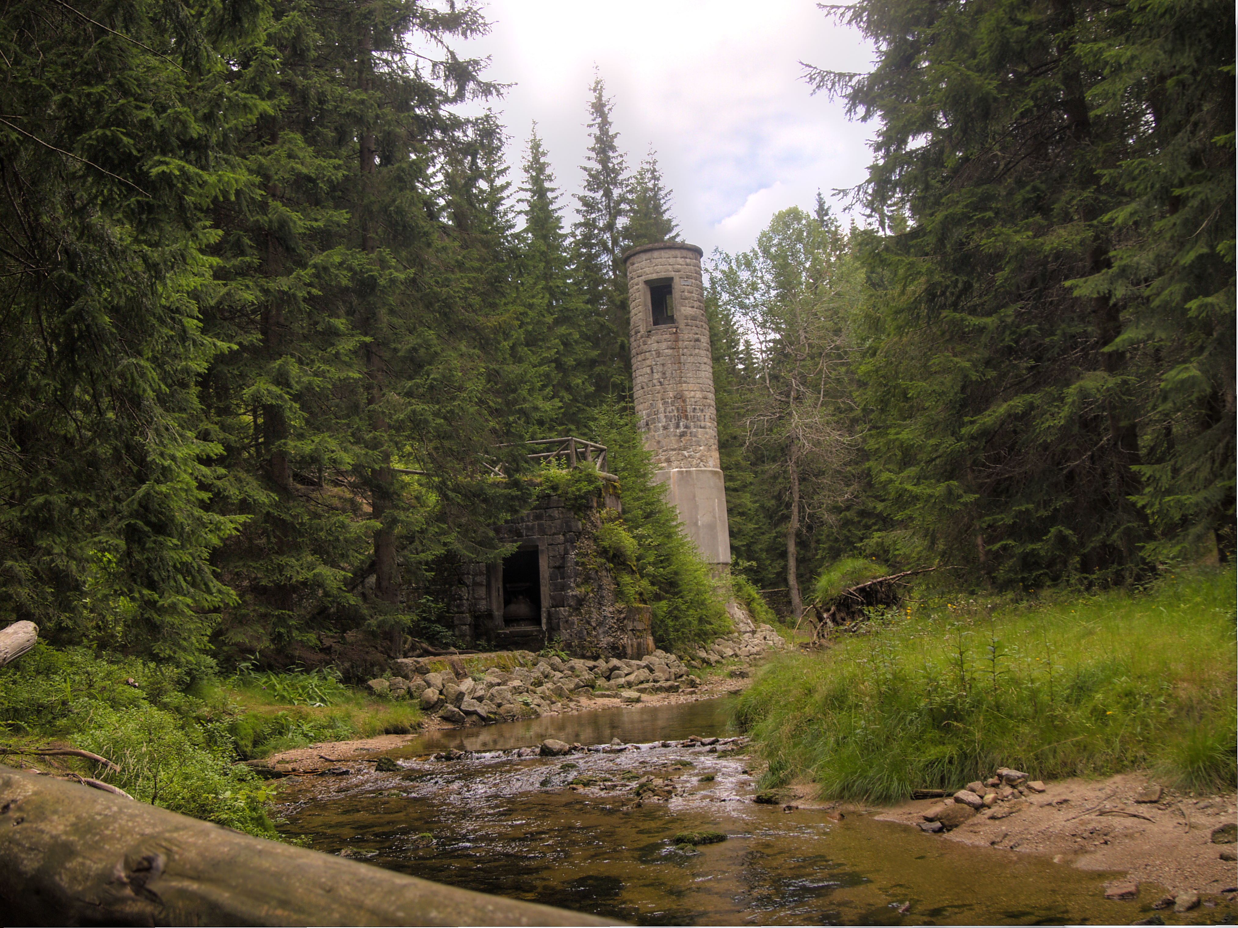 Protržená přehrada na Bílé Desné - pohled proti tělesu hráze (proti toku řeky) - uprostřed šoupátková věž, pod ní šoupátková komora s viditelným provozním uzávěrem, po pravé a levé straně zbytky sypané hráze